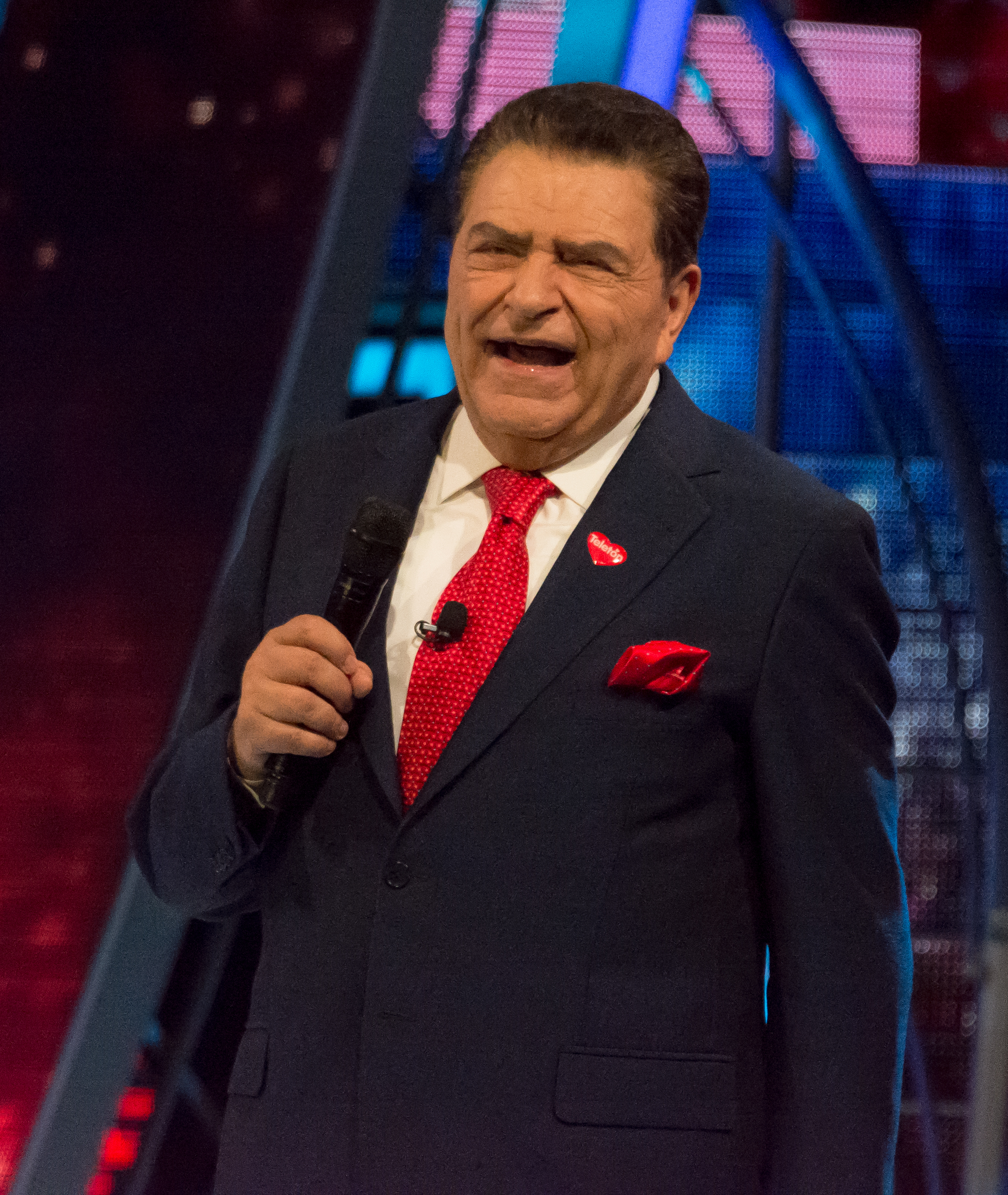 Don Francisco, Teletón 2018, Teatro Teletón, Santiago, Chile.